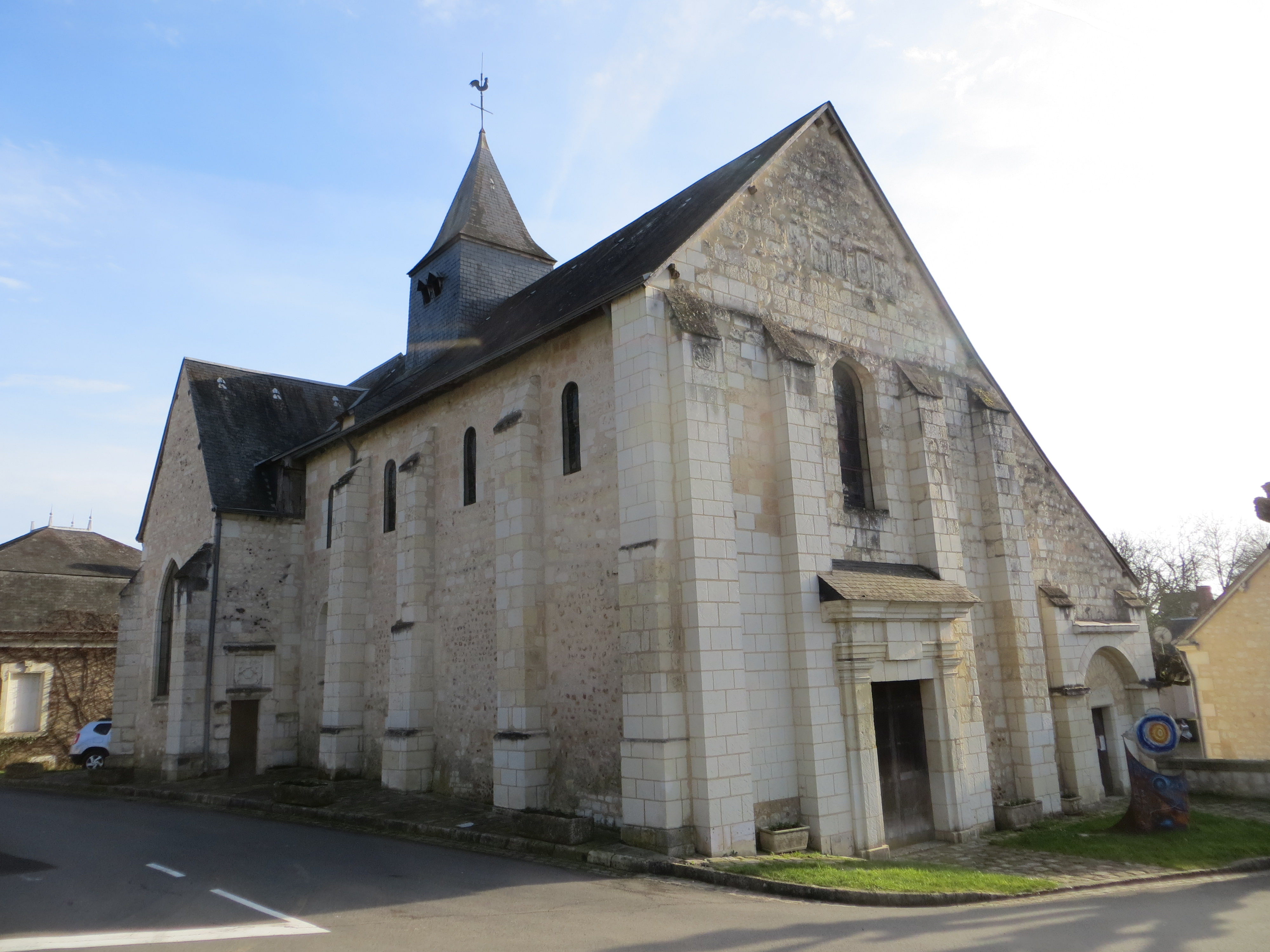 Eglise Saint Pierre de Veuil